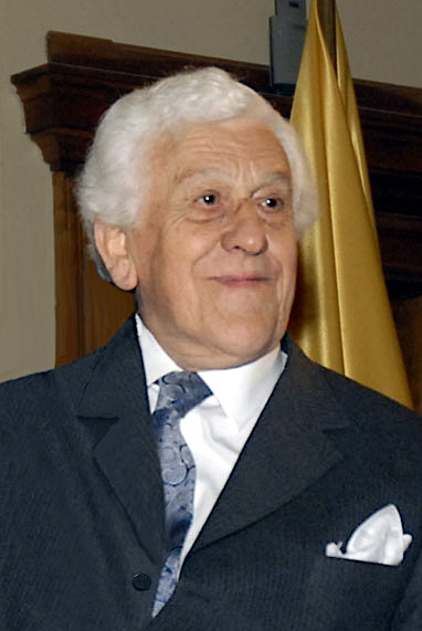 Crop de la foto en que Juan de Dios Vial LarraínJuan de Dios Vial Larraín, abogado y flósofo chileno, recibe el grado de Doctor Scientiae et Honoris Causa